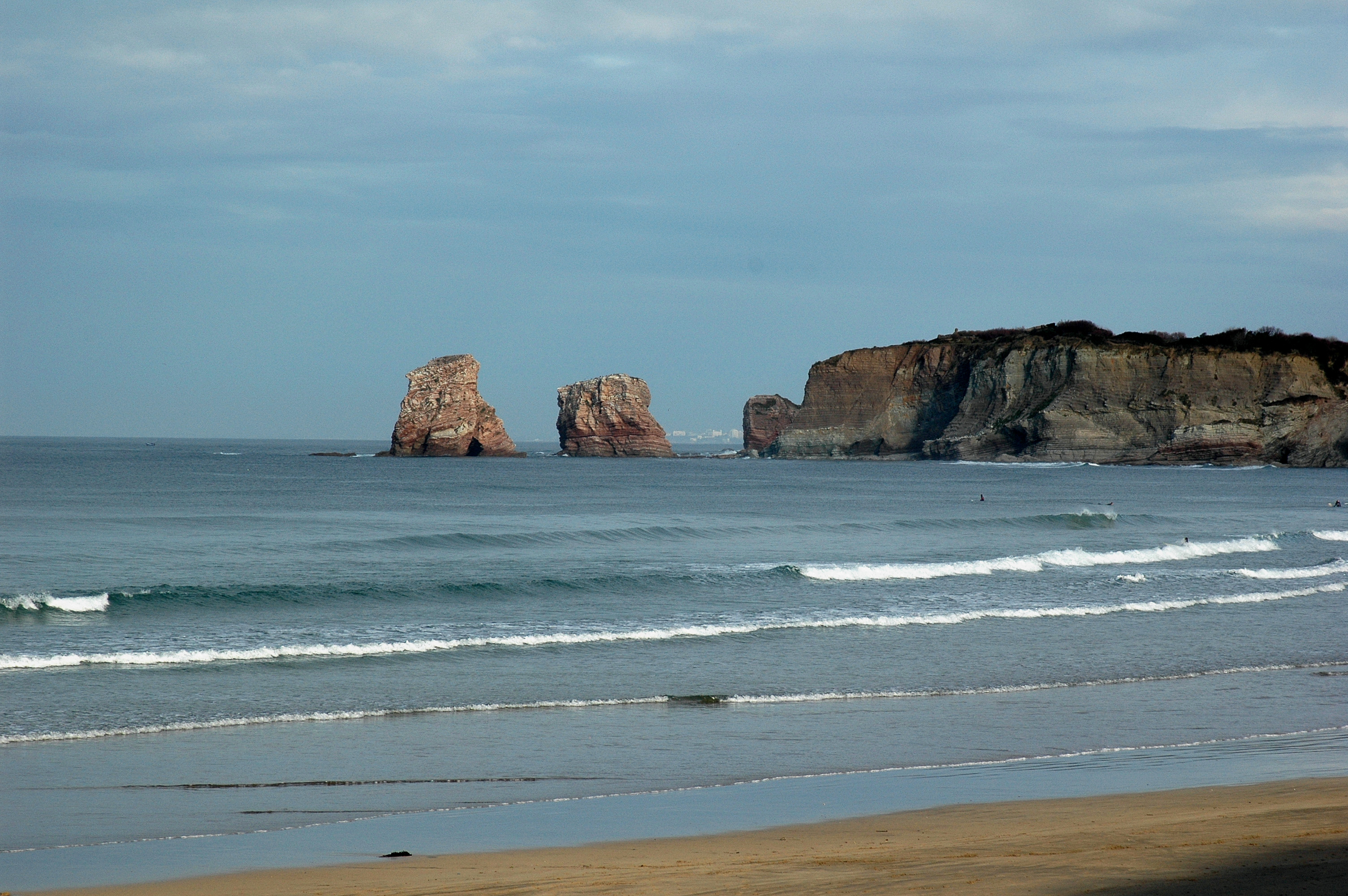 Hendaye, les jumeaux. Photo prise le 06/01/07 par Harrieta171